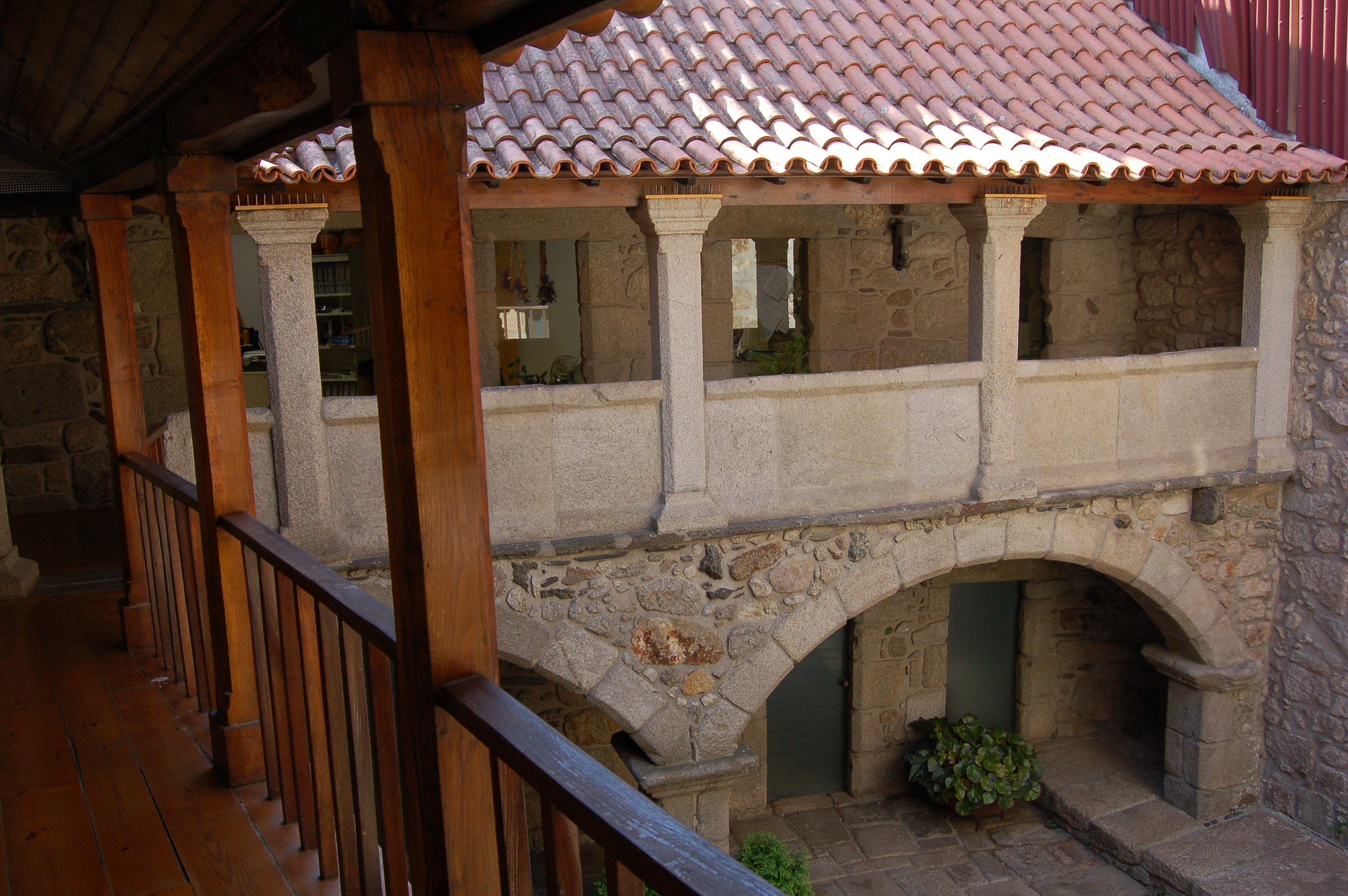 Hospital Velho (interior) This file was uploaded for Wiki Loves Monuments in Portugal with the unique identifier 97006584.